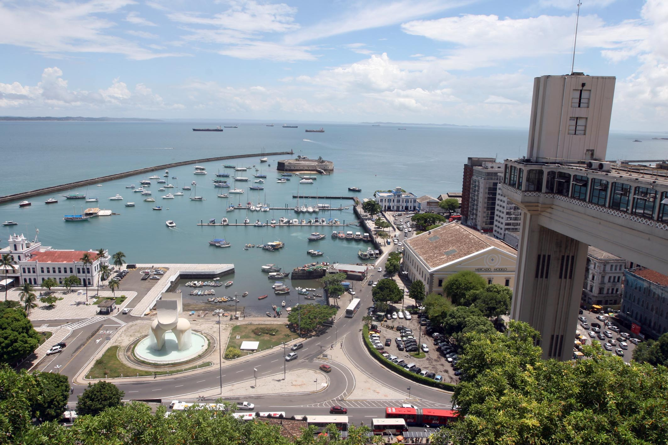 Baía de Todos-os-Santos. Na foto: Vista do Palácio do Rio Branco.